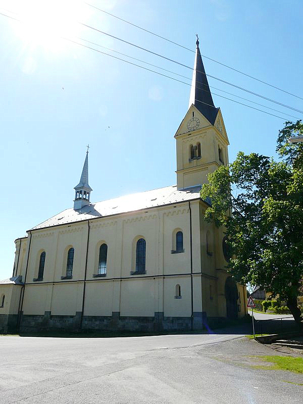 Kostel